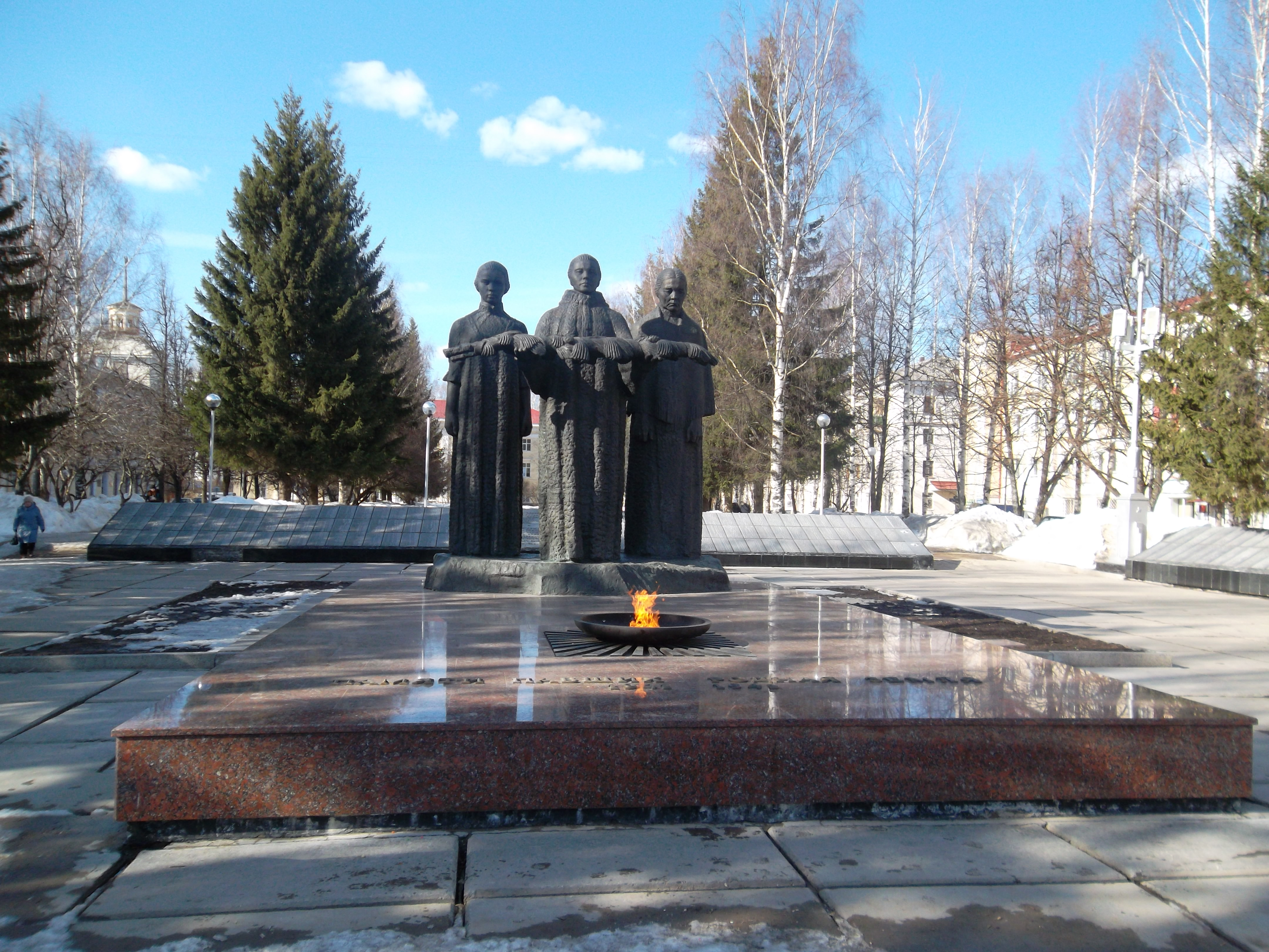 Мемориальный комплекс в Сыктывкаре.Коми: Сыктывкарса мемориальнöй комплекс.